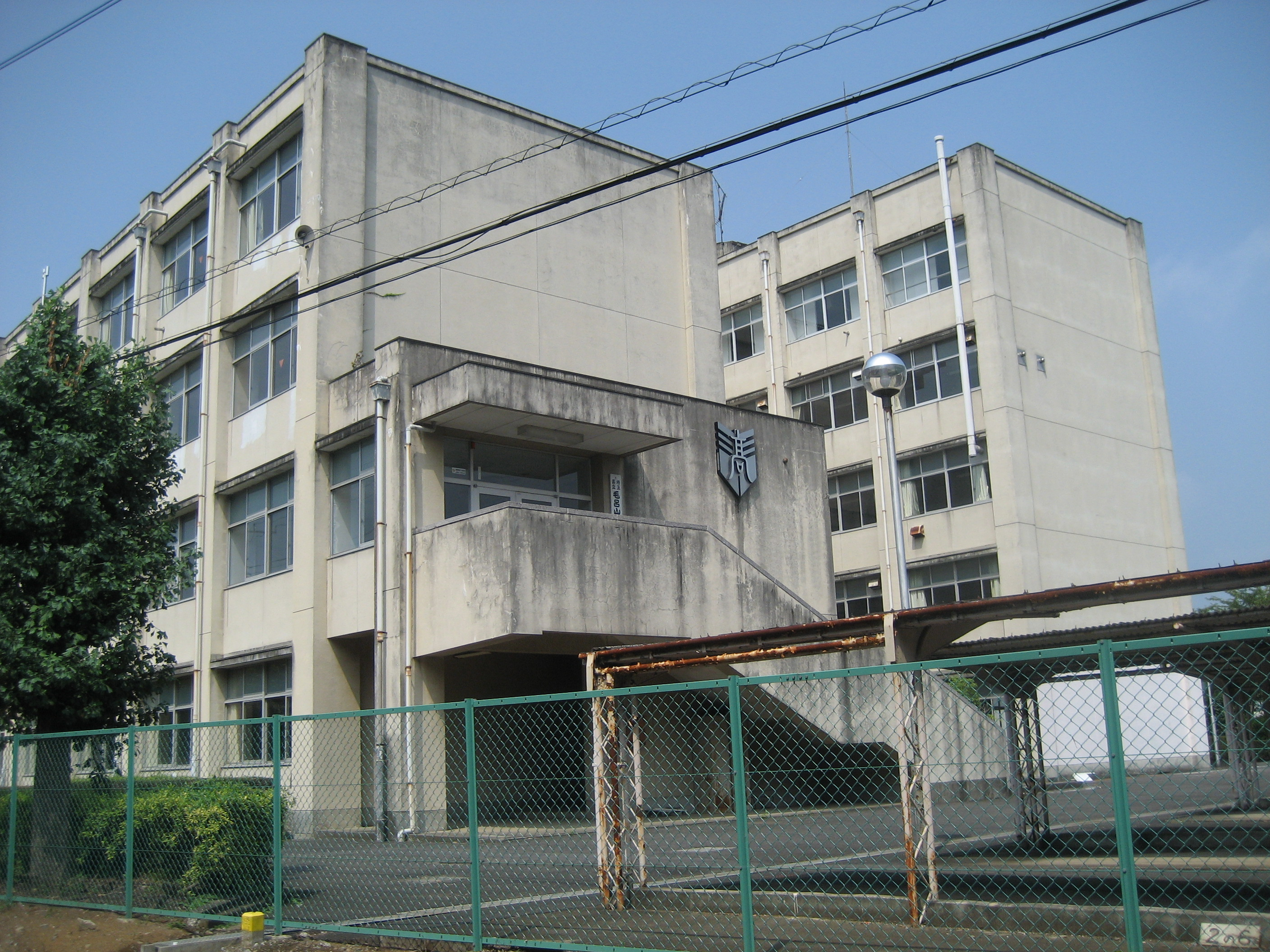 埼玉県立毛呂山高等学校（校舎付近を撮影）